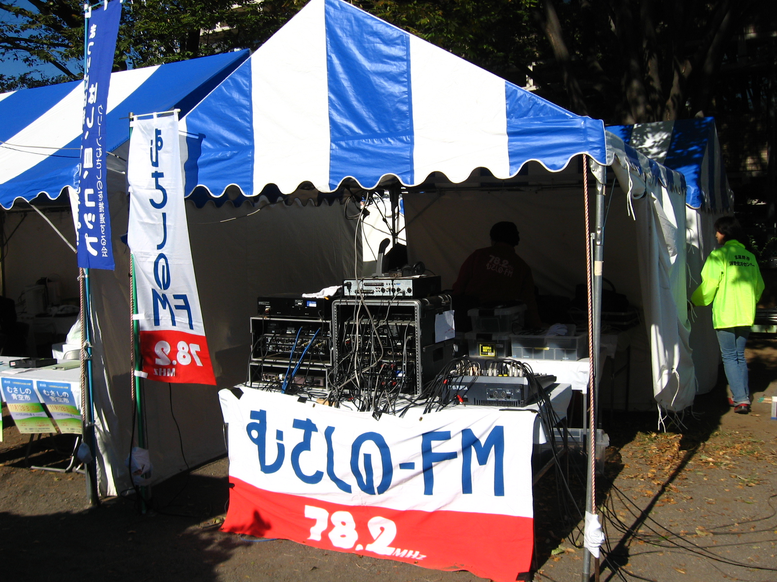 Musashino-FM